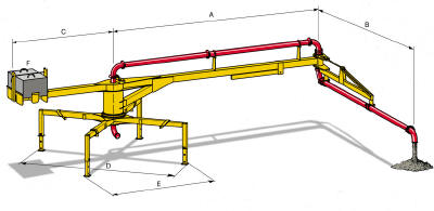 משאבה סטטית ידנית. התמונה באדיבות Putzmeister . את האישור ניתן למצוא כאן.